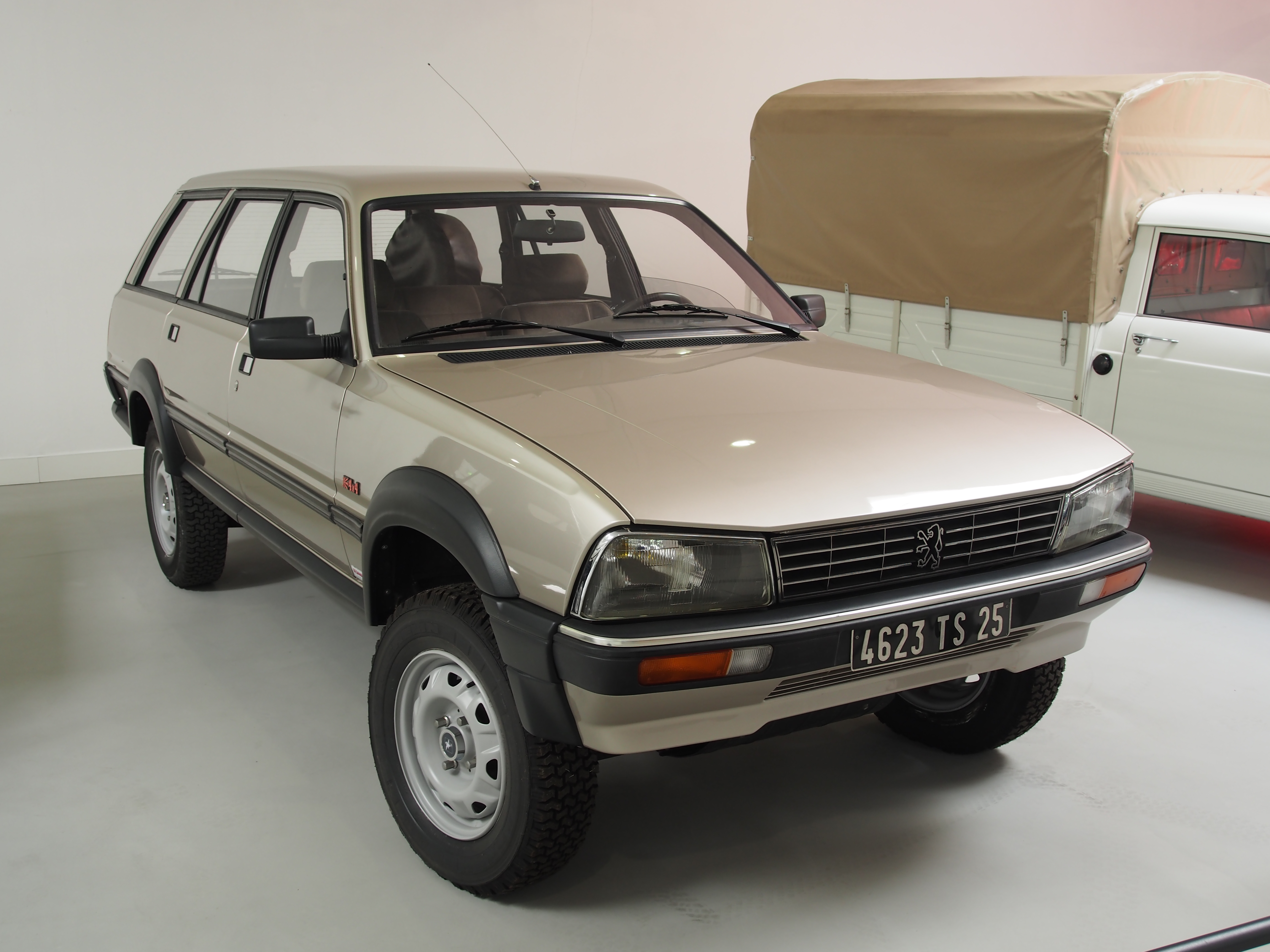 Photographed at the Musée de l'Aventure Peugeot-Sochaux, France.